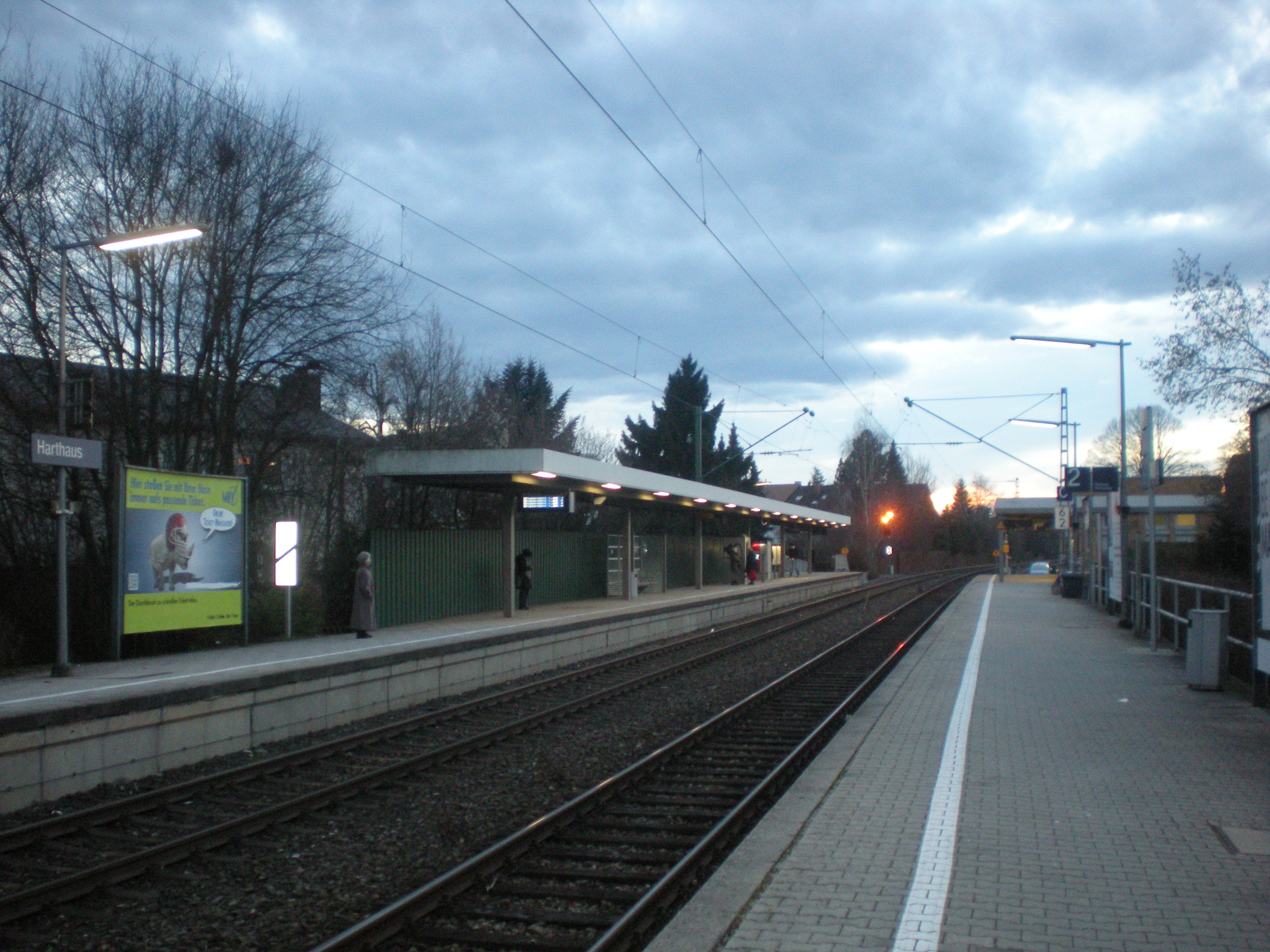 Seitenbahnsteige des Haltepunkts Harthaus der S-Bahn München (2012)